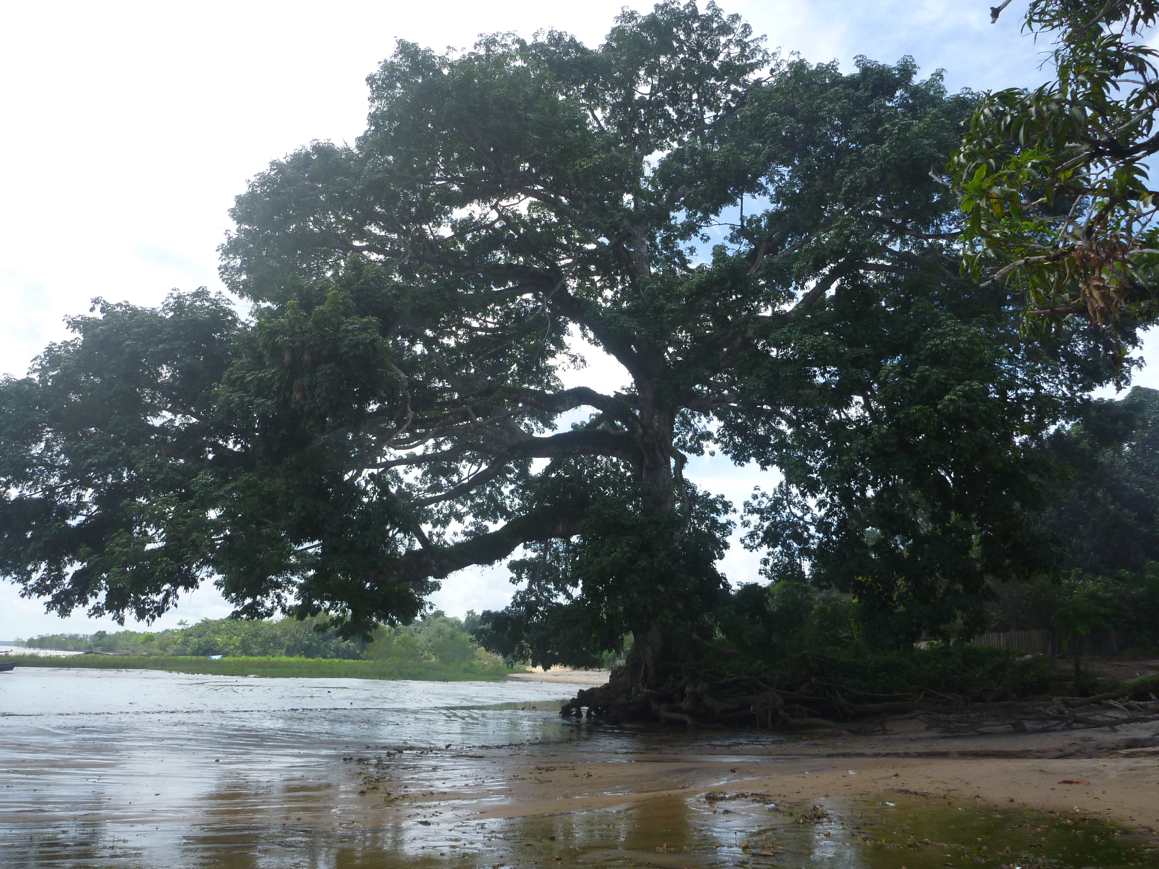 Grande e centenária árvore.